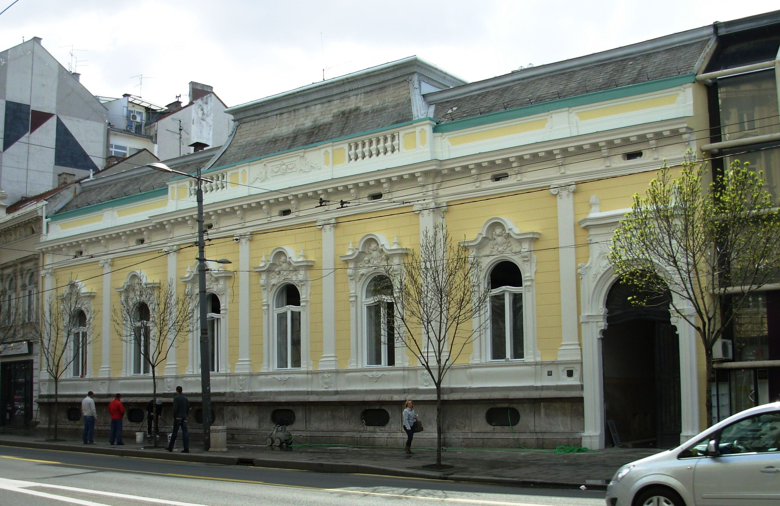 Крсмановићева кућа у Београду. Сликао Голдфингер